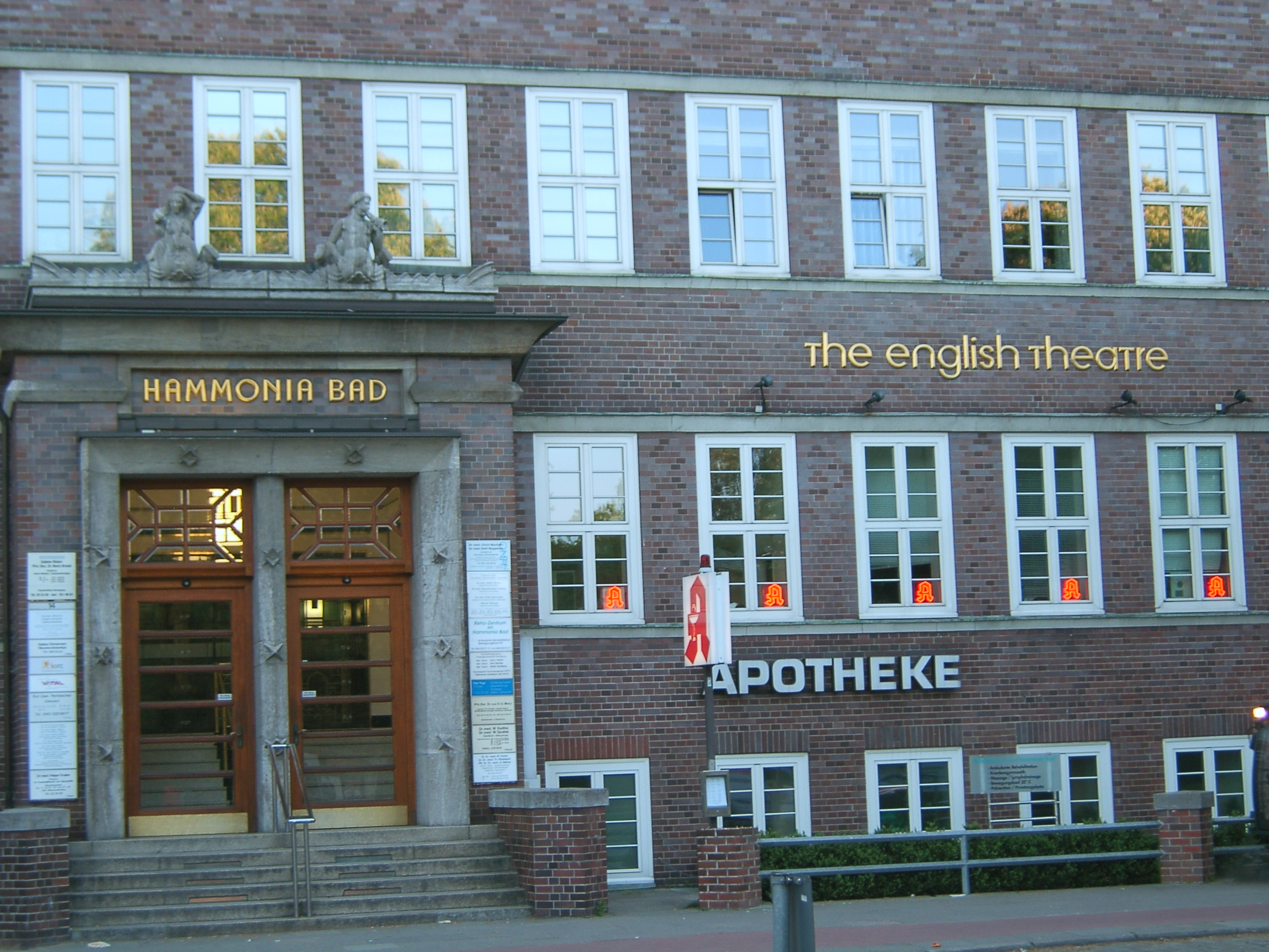 Im ehemaligen Hammonia-Bad auf der Uhlenhorst, 1926 - 28 von Carl Feindt erbaut, hat heute das the english theatre seinen Sitz. Im Inneren befinden sich Plastiken von Richard Kuöhl.